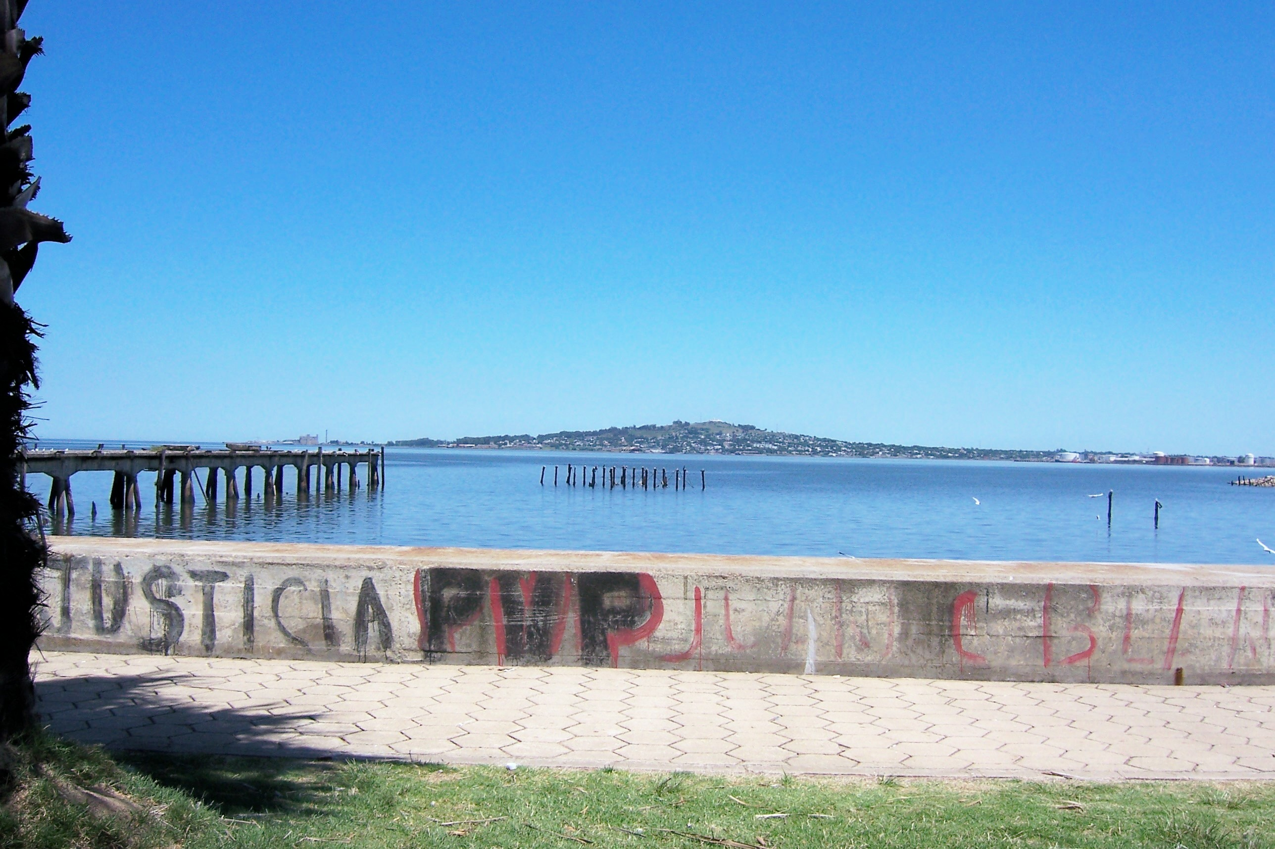 Vista de la bahía de Montevideo, con el cerro al fondo. A la derecha de la imagen se puede ver parte de la refinería de ANCAP (Planta La Teja).